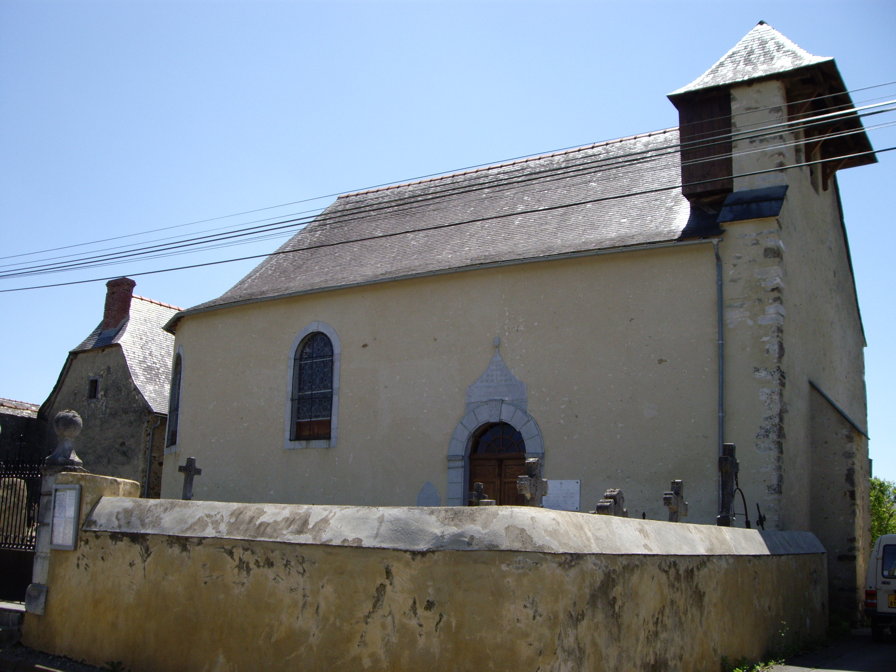 église (Visker, 65)